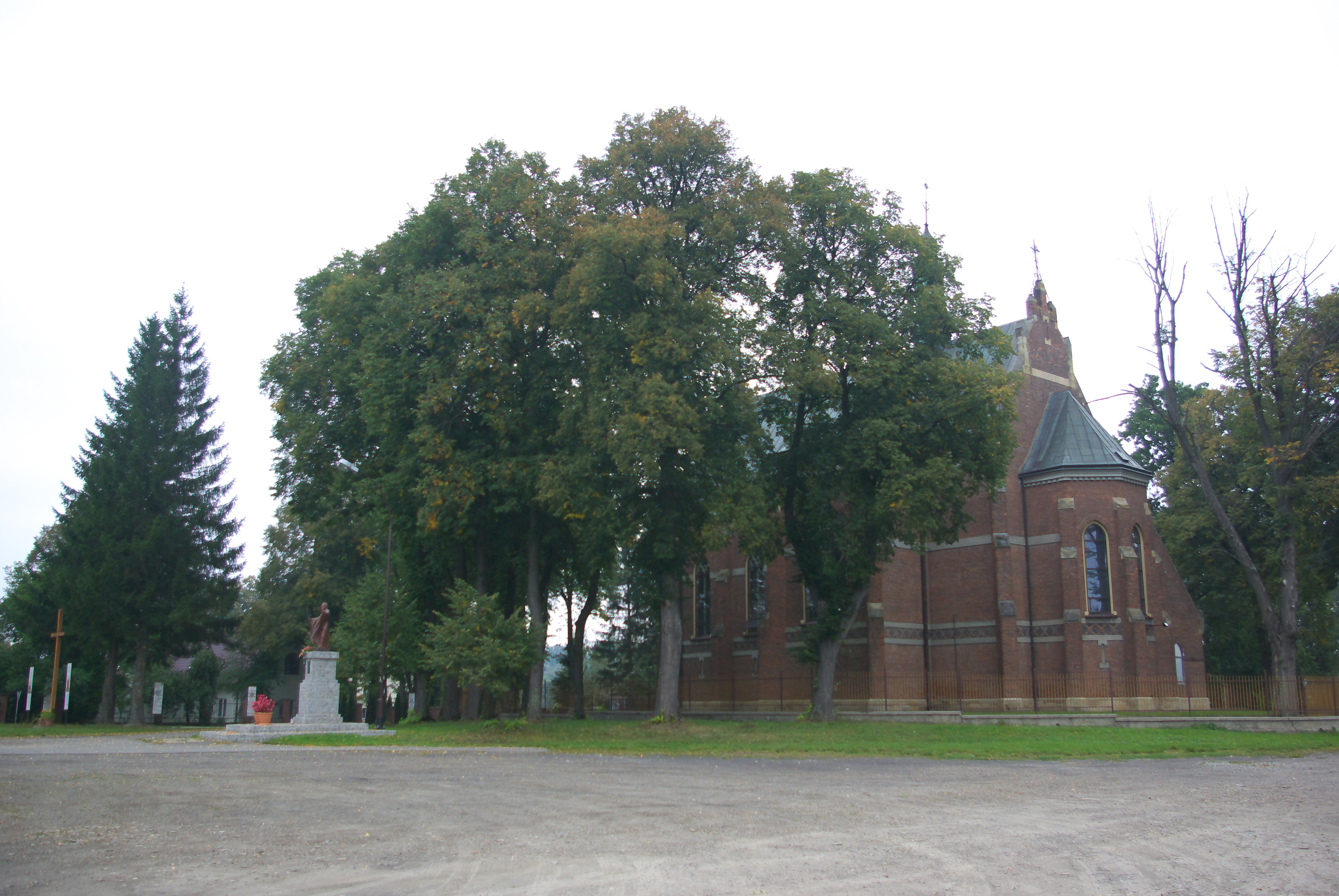 Kościół św. Katarzyny Aleksandryjskiej w Strachocinie